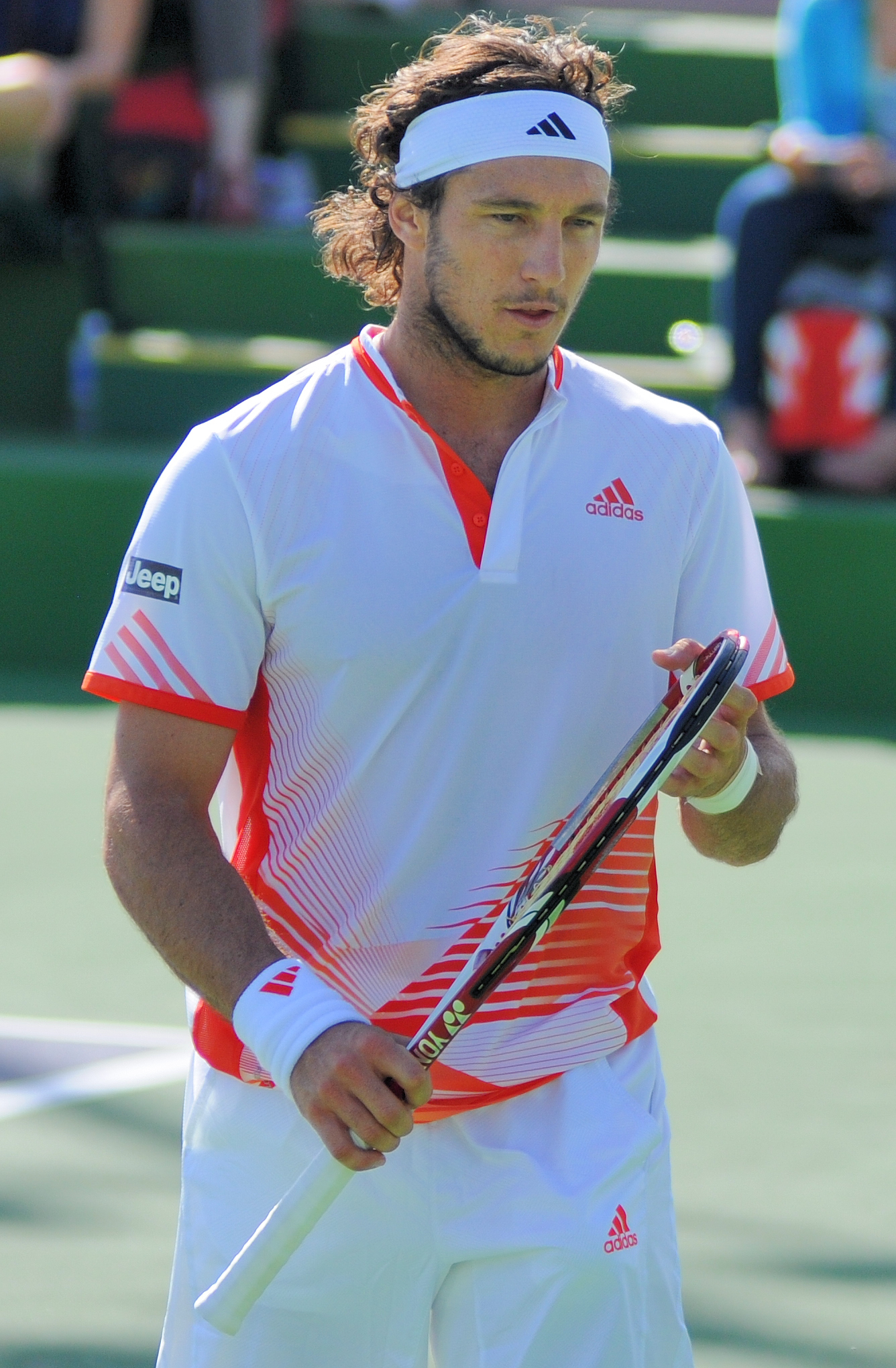 BNP Paribas Open 2012